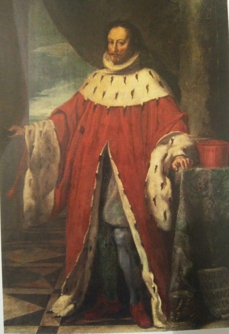 Ritratto di S.E. il Principe don Filippo I Colonna